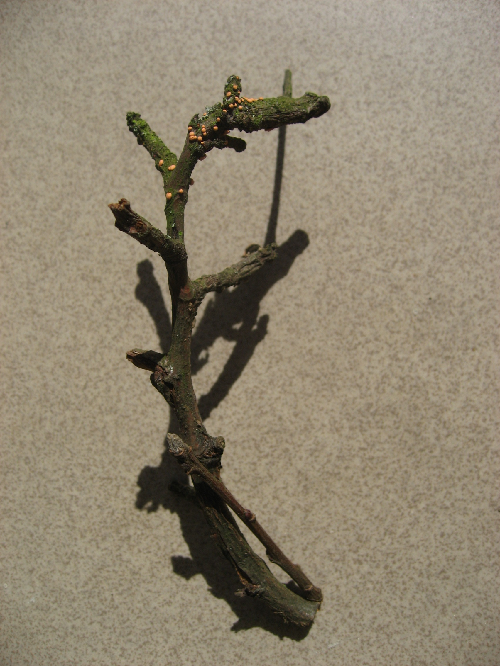 Pomladanska jablanova vejica, okužena z rdečo sušico listavcev.